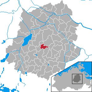 Lindenberg, Landkreis Demmin, Mecklenburg-Vorpommern